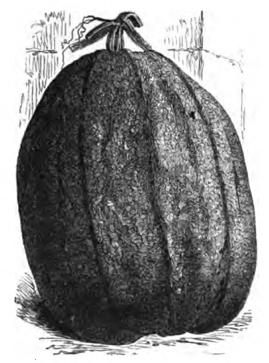 Les plantes potagères. Description et culture des principaux légumes des climats tempérés, 1re édition, ouvrage publié par la maison Vilmorin-Andrieux & Cie à Paris en 1883.